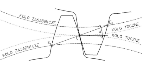 Ząb koła zębatego - rys. techniczny. Autor: Paweł Wajda, 2004